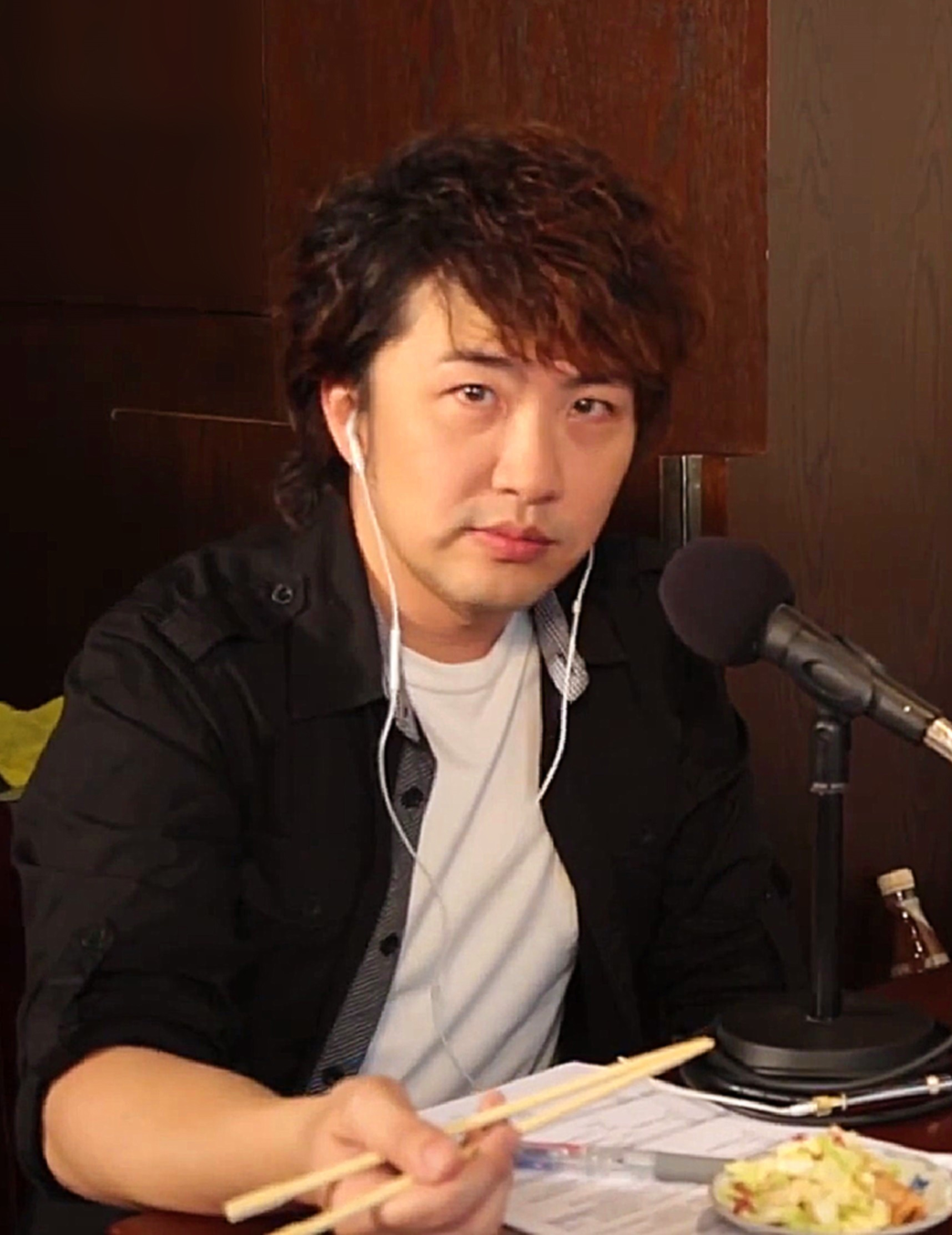 中文（香港）: 香港男歌手、音樂人教室（MMP集團）總裁及校長、基督教基立聖工學院副院長。